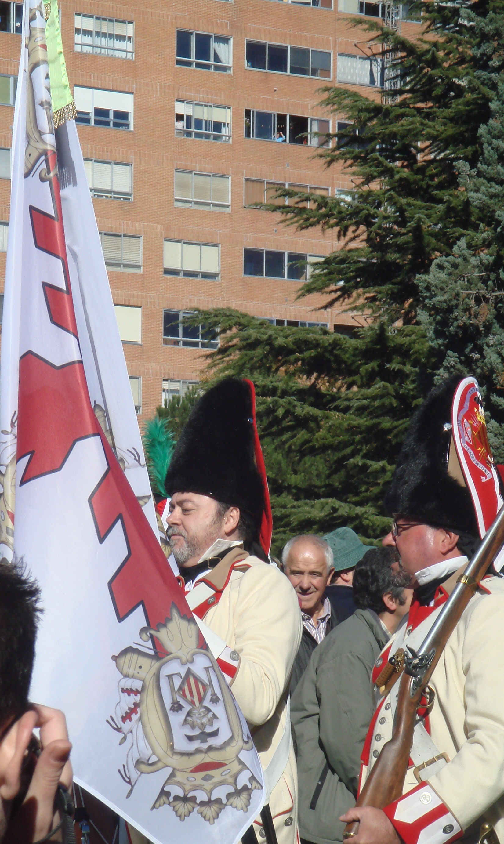 Conmemoración de la Batalla de Gamonal, Burgos, España, 2007.